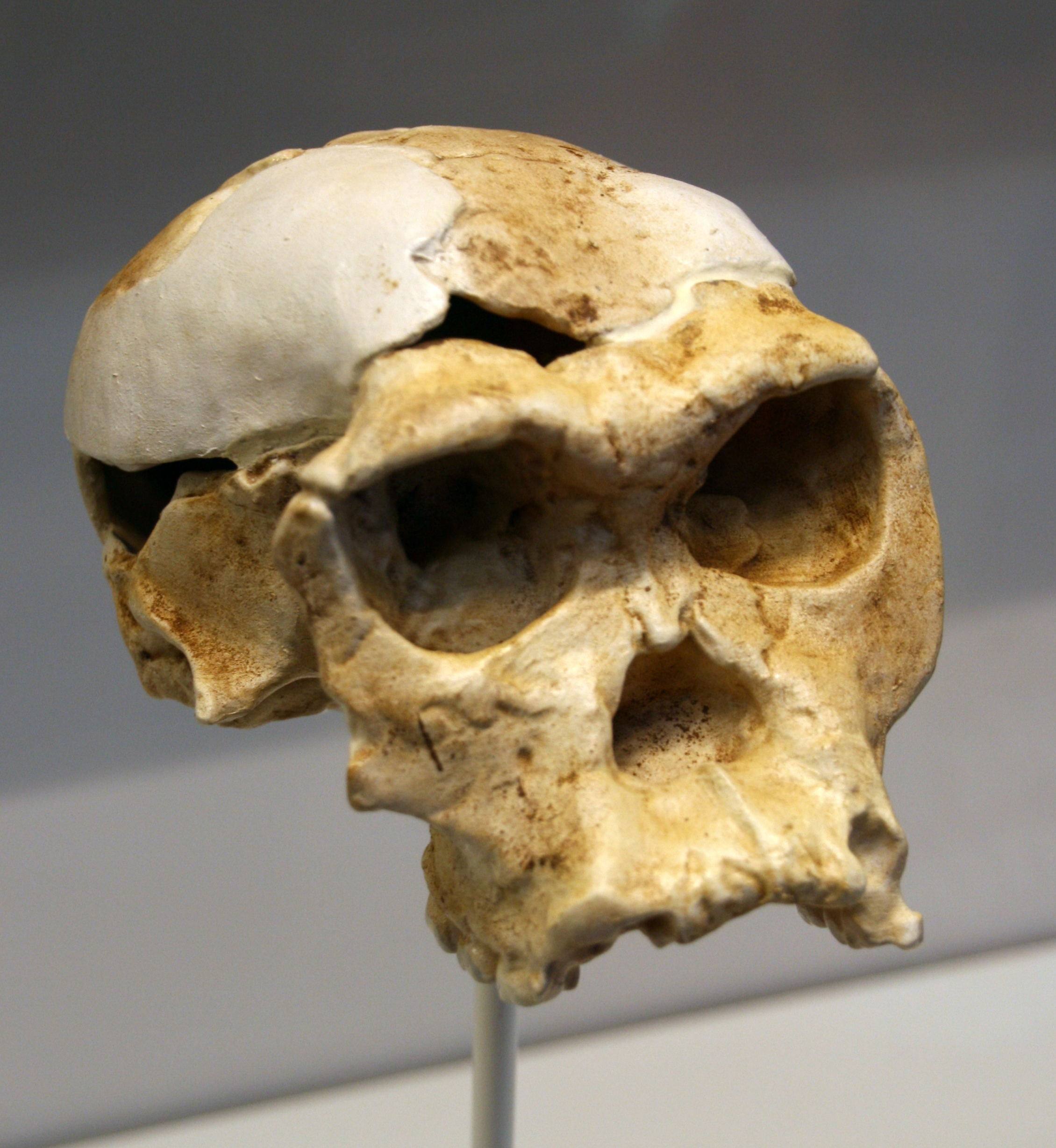 Cráneo y calota de Homo habilis, OH 24 o "Twiggy". Réplica Original: inmediaciones de DK, Garganta de Olduvai (Tanzania). 1,8 millones de años Museo Nacional de Dar Es Salaam (Tanzania) Réplica: Instituto de Evolución en África Exhibido en exposición temporal, "La cuna de la humanidad", en el Museo Arqueológico de Regional de Madrid